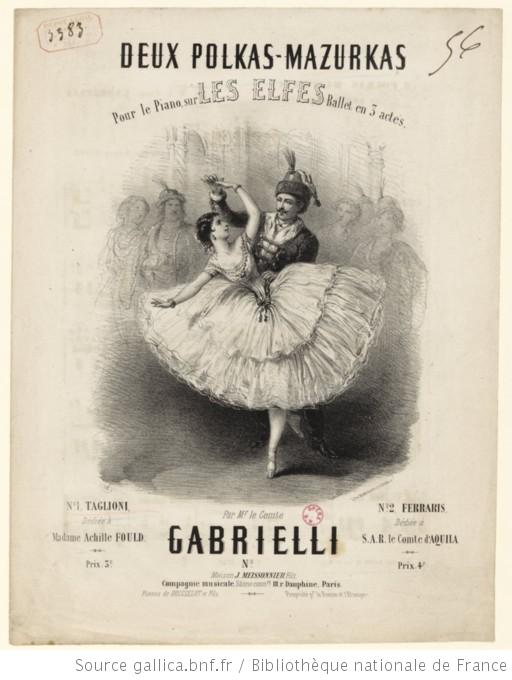 Frontispice du livret du ballet "Les Elfes" (1856) Gallica-Bibliothèque nationale de France